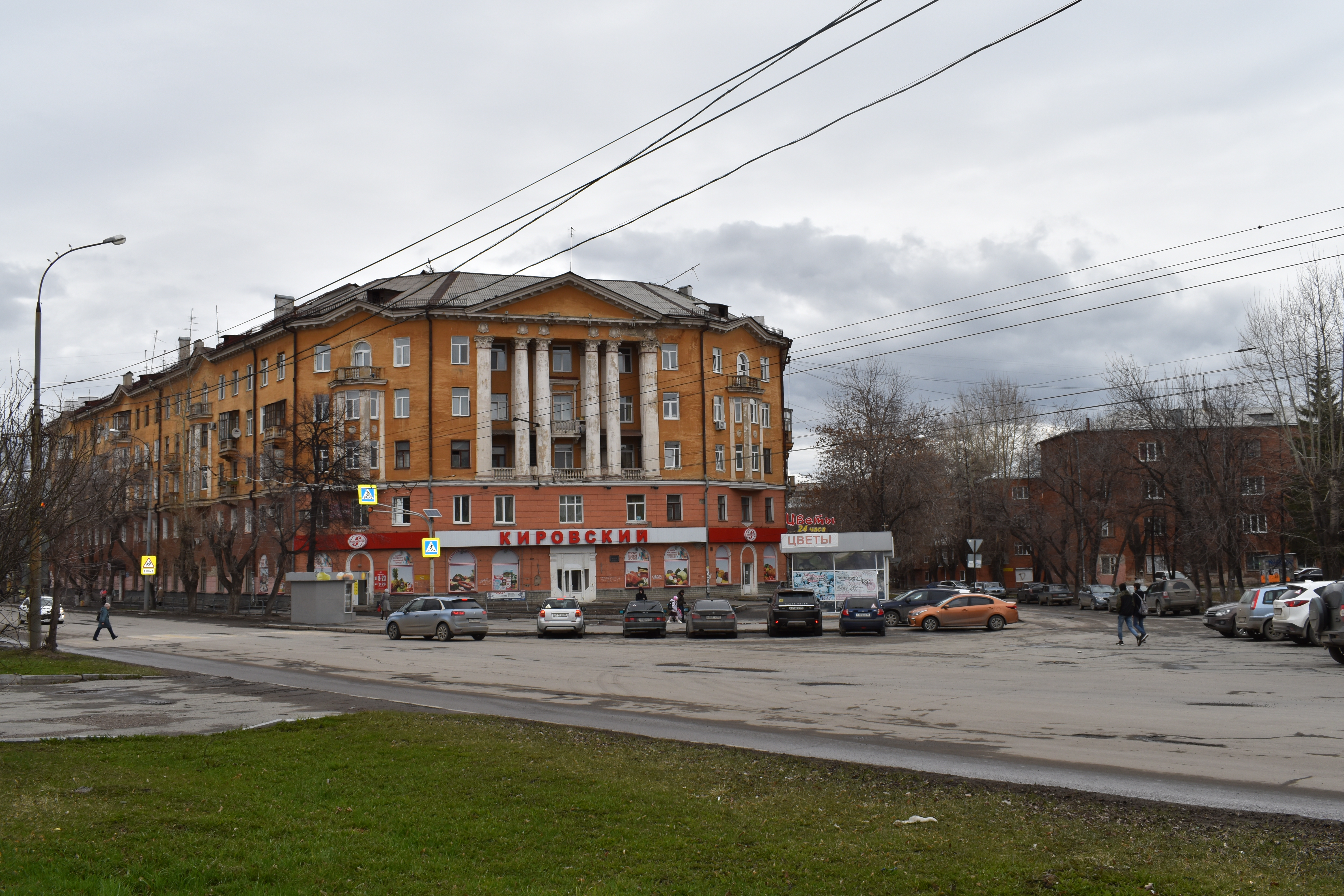 Проспект Орджоникидзе в Екатеринбурге. Перекрёсток улиц Стахановская, Краснознамённая и проспекта Орджоникидзе. В кадре — дом № 10